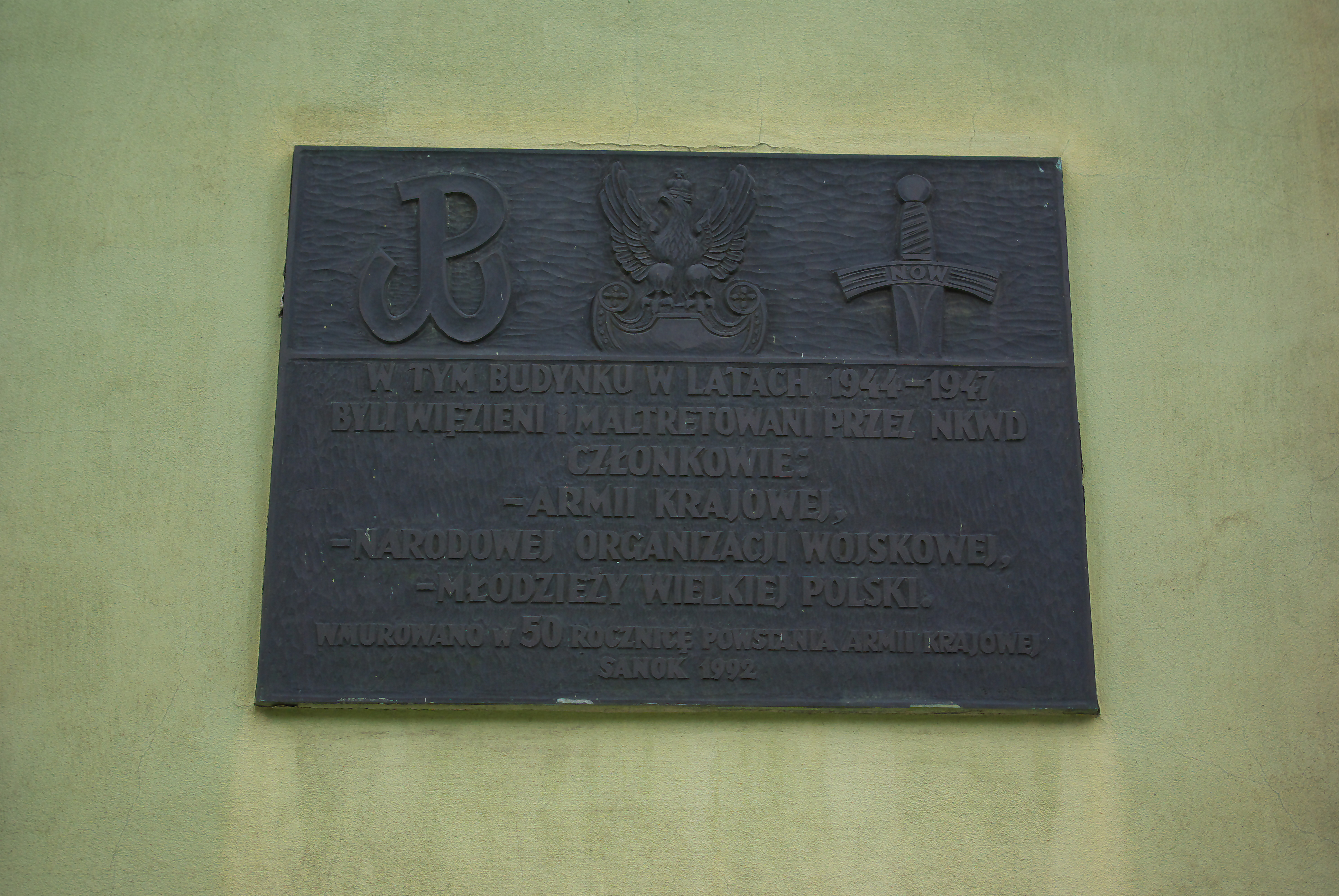 Tablica pamiątkowa (AK-owska) na fasadzie budynku przy ulicy Kościuszki 4.